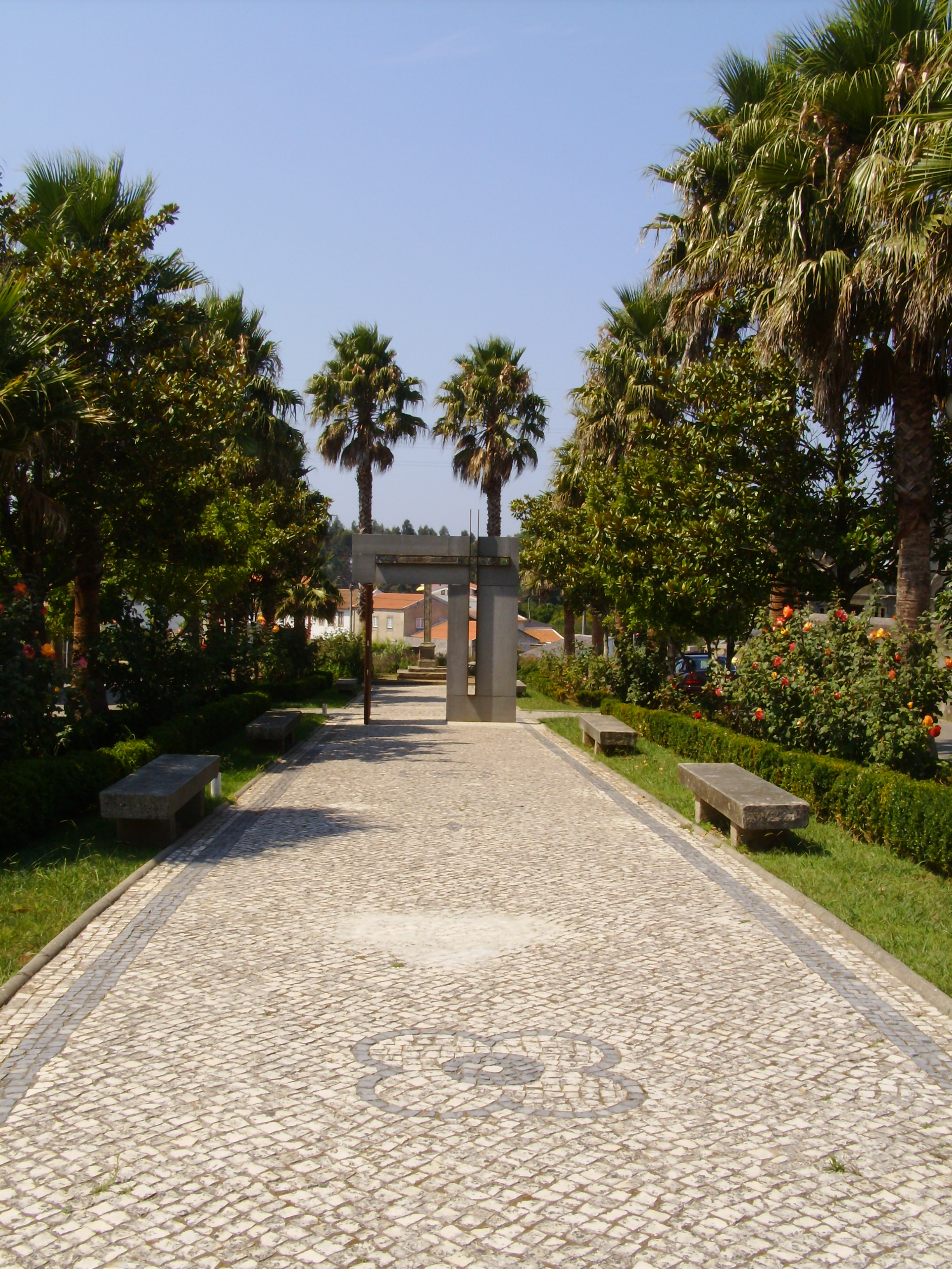 Igreja de Santa Marinha de Cortegaça, concelho de Ovar, distrito de Aveiro, Portugal: jardim dianteiro com pórtico comemorativo do centenário.